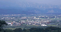 八卦山下的芬園鄉。Bân-lâm-gú: Pat-kuà-suann suann-kha ê Hun-hn̂g-hiong. 八卦山山跤的芬園鄉。